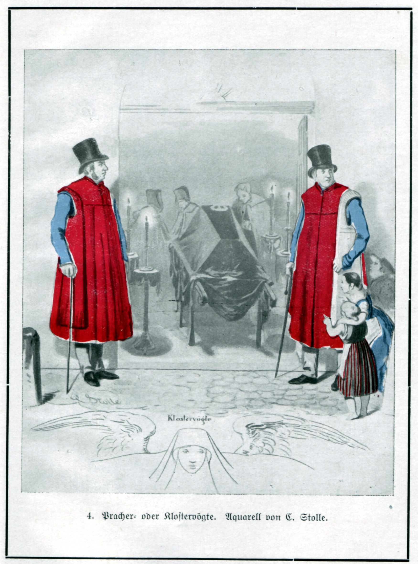 Lübecker Amtstrachten: Prachervögte, auch Klostervögte genannt